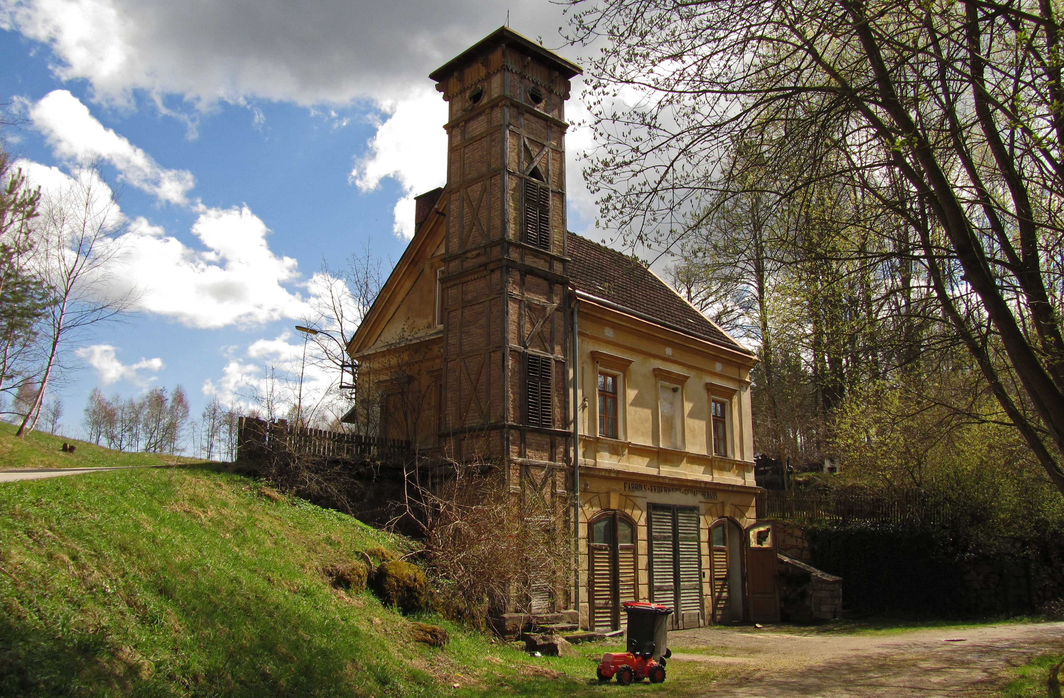 Ehemaliges Feuerwehrhaus der Firma Backhausen